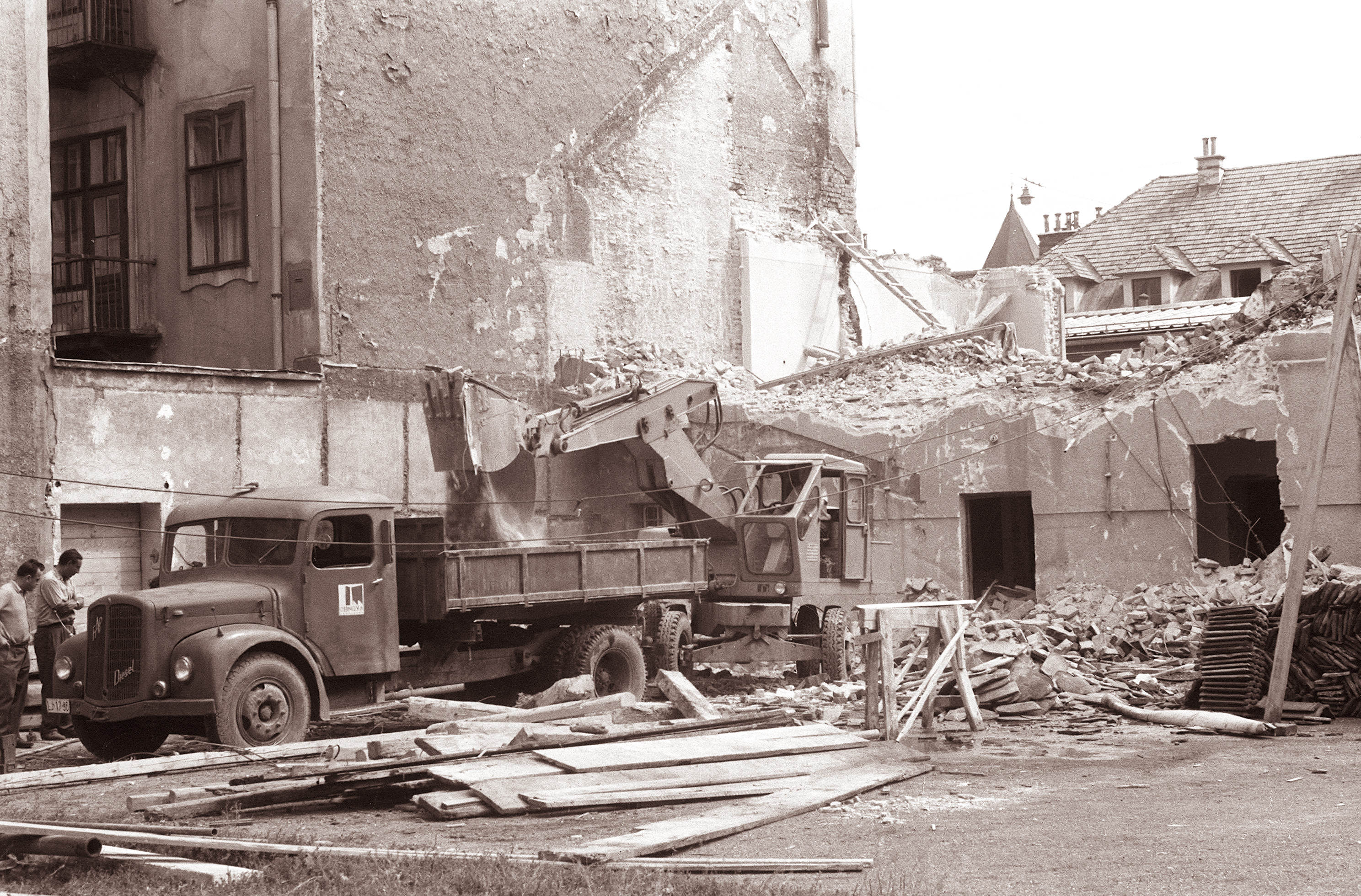 Rušenje hiš v Ljubljani